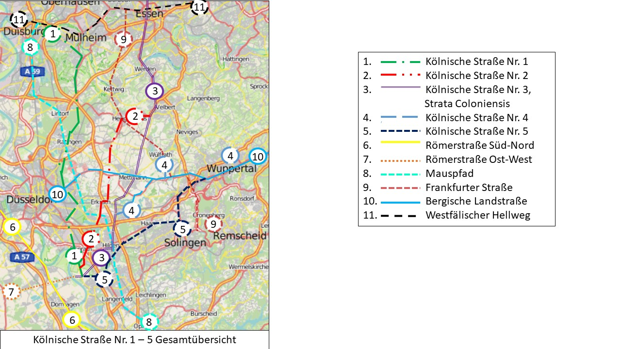 Kölnische Straßen Nummer 1-5, Übersicht (n. E. Krumme) Basic informations: Erich Krumme, Die Kölnischen Straßen im Niederbergischen Raum, Romerike Berge, Zeitschrift für Heimatpflege im Bergischen Land 11. Jg. 1961/62 Heft 2, S. 68-80; Background of maps: Openstreetmap